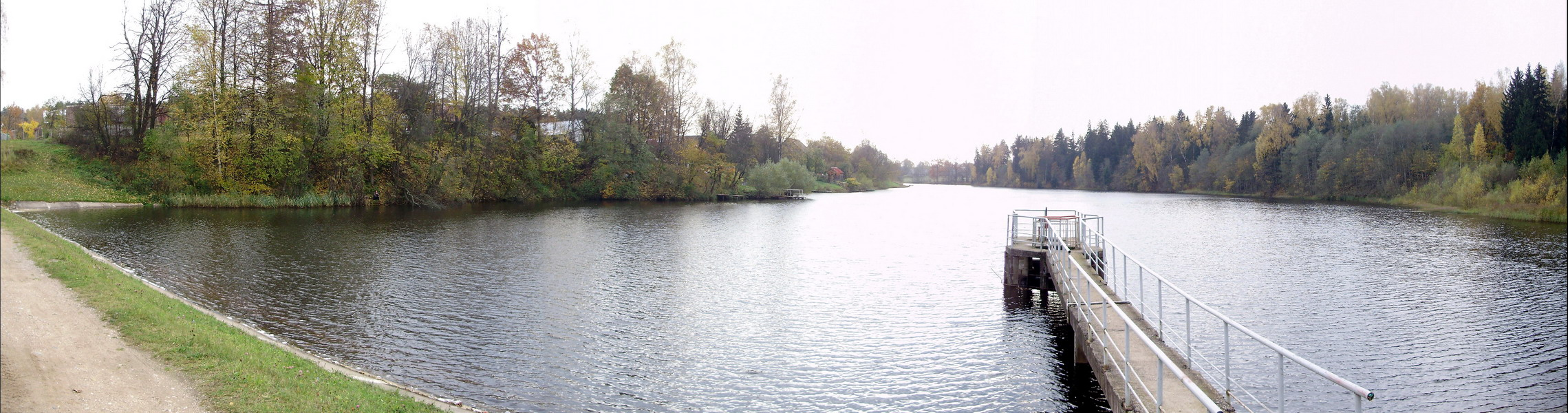 Šveicarija pond, Jonava district, Lithuania.